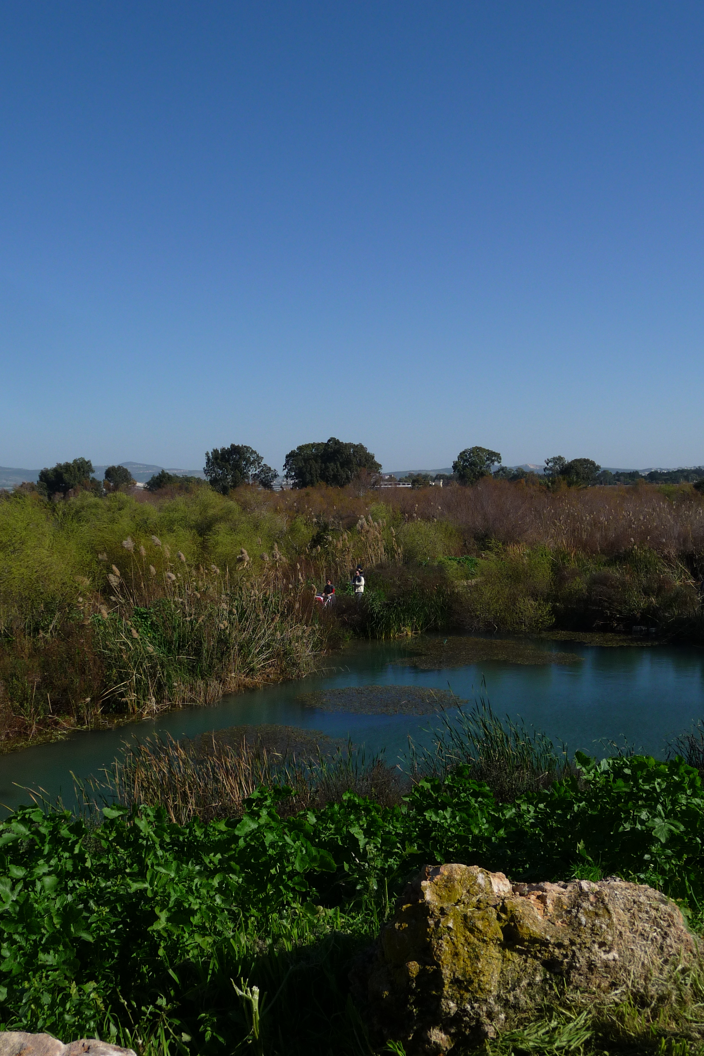 שמורת טבע בעמק זבולון, מזרחית לקריית ביאליק. השמורה כוללת הן את המעיינות והביצות המהווים את מקורו של נחל נעמן והן את האתר הארכאולוגי תל אפק. השמורה הוכרזה ב-1979 והיא משתרעת על פני 660 דונם. ב-1996 הוכרה השמורה כ"אתר רמסר" בהתאם לאמנת רמסר לשימור ולפיתוח בר-קיימא של בתי גידול לחים.